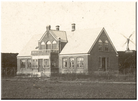 Eksempel på proprietærgaard: Kirkebygaard